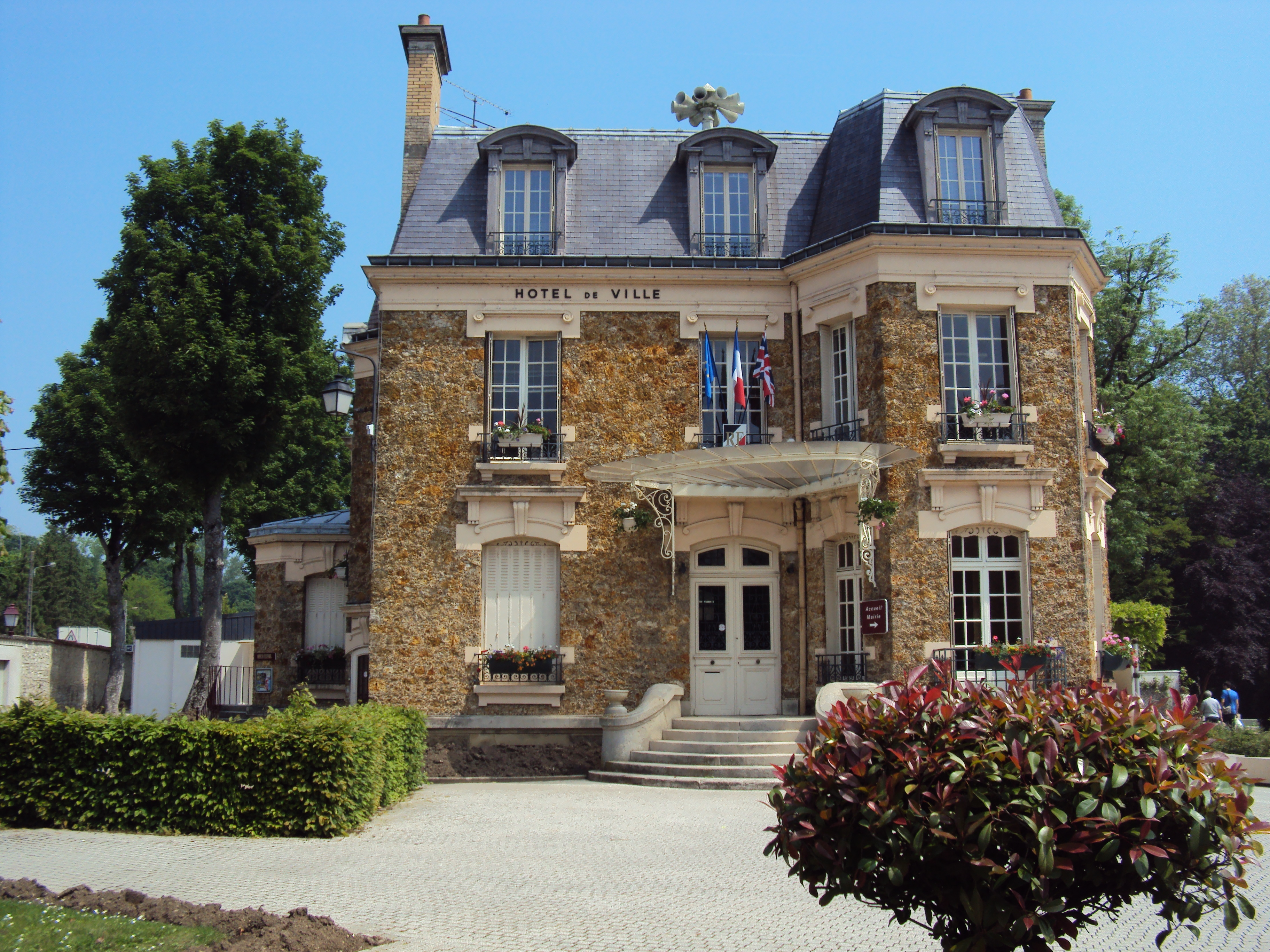 Mairie de Lizy-Sur-Ourcq